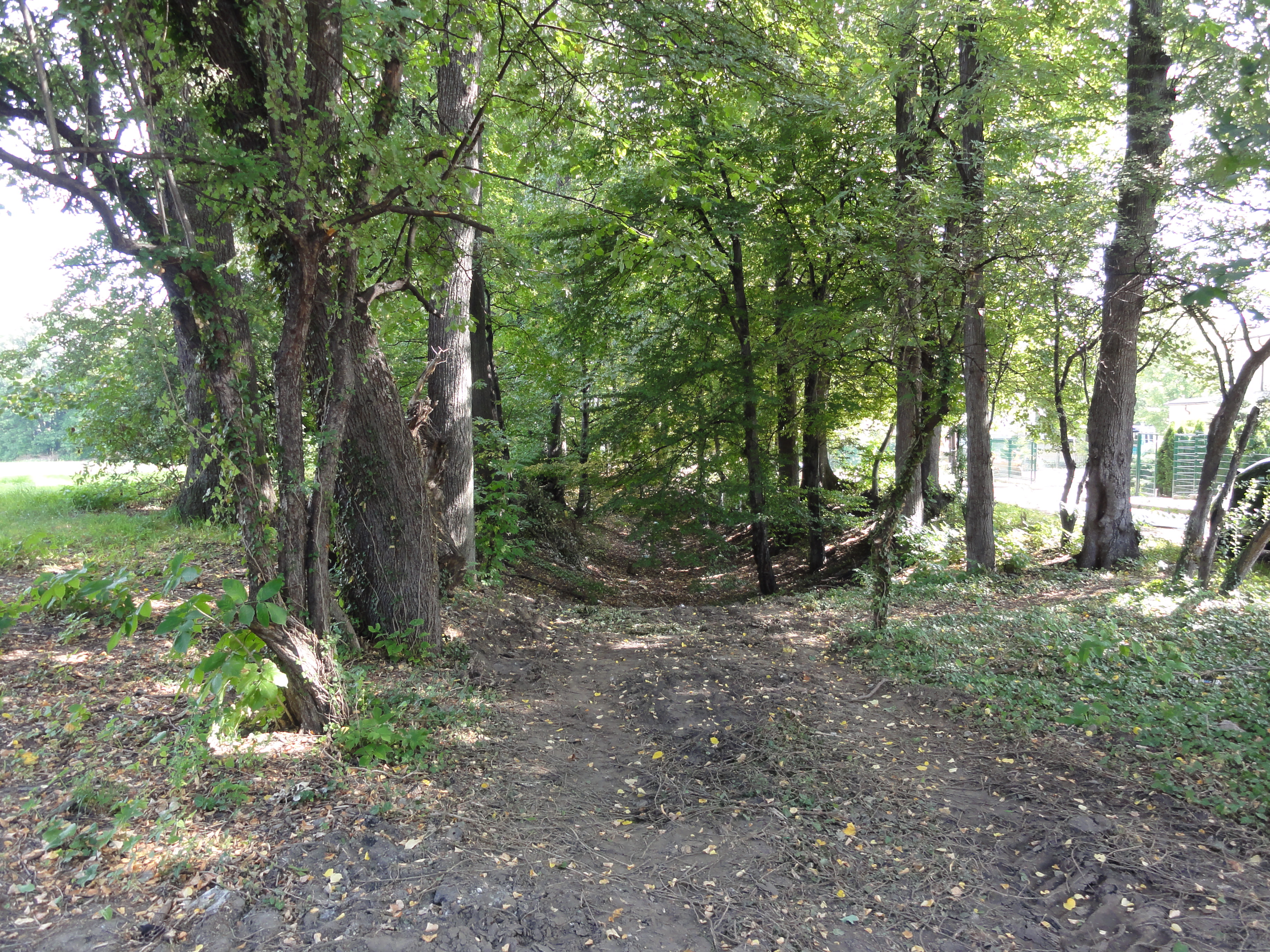 Grodzisko w Starym Bielsku, Bielsko-Biała